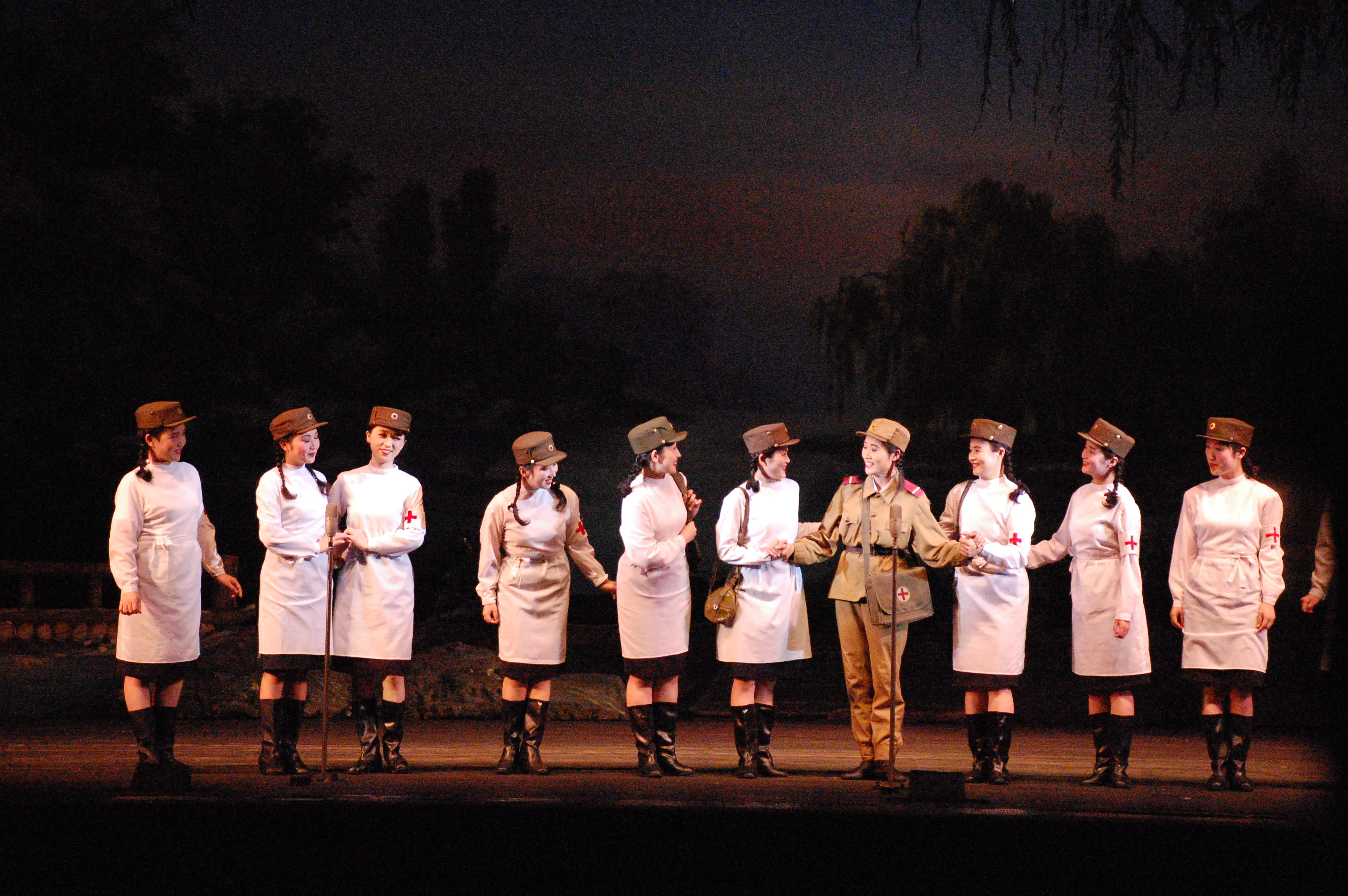 North Korea — Pyongyang Opera